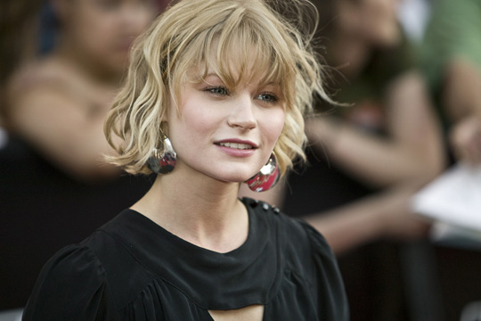 MMVAs